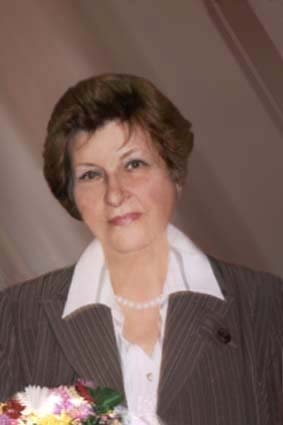 Ольга Рутковська